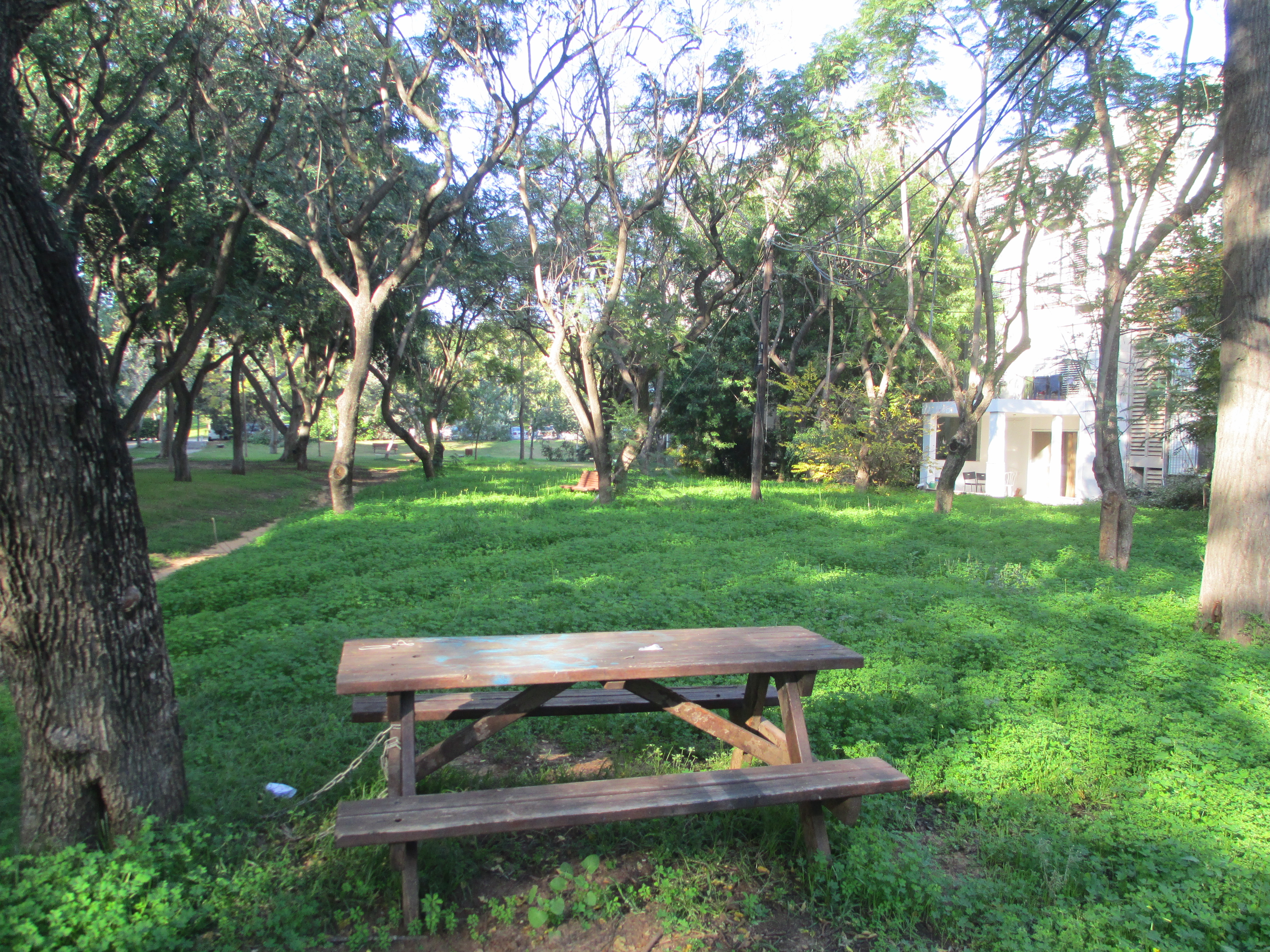 מעוז אביב